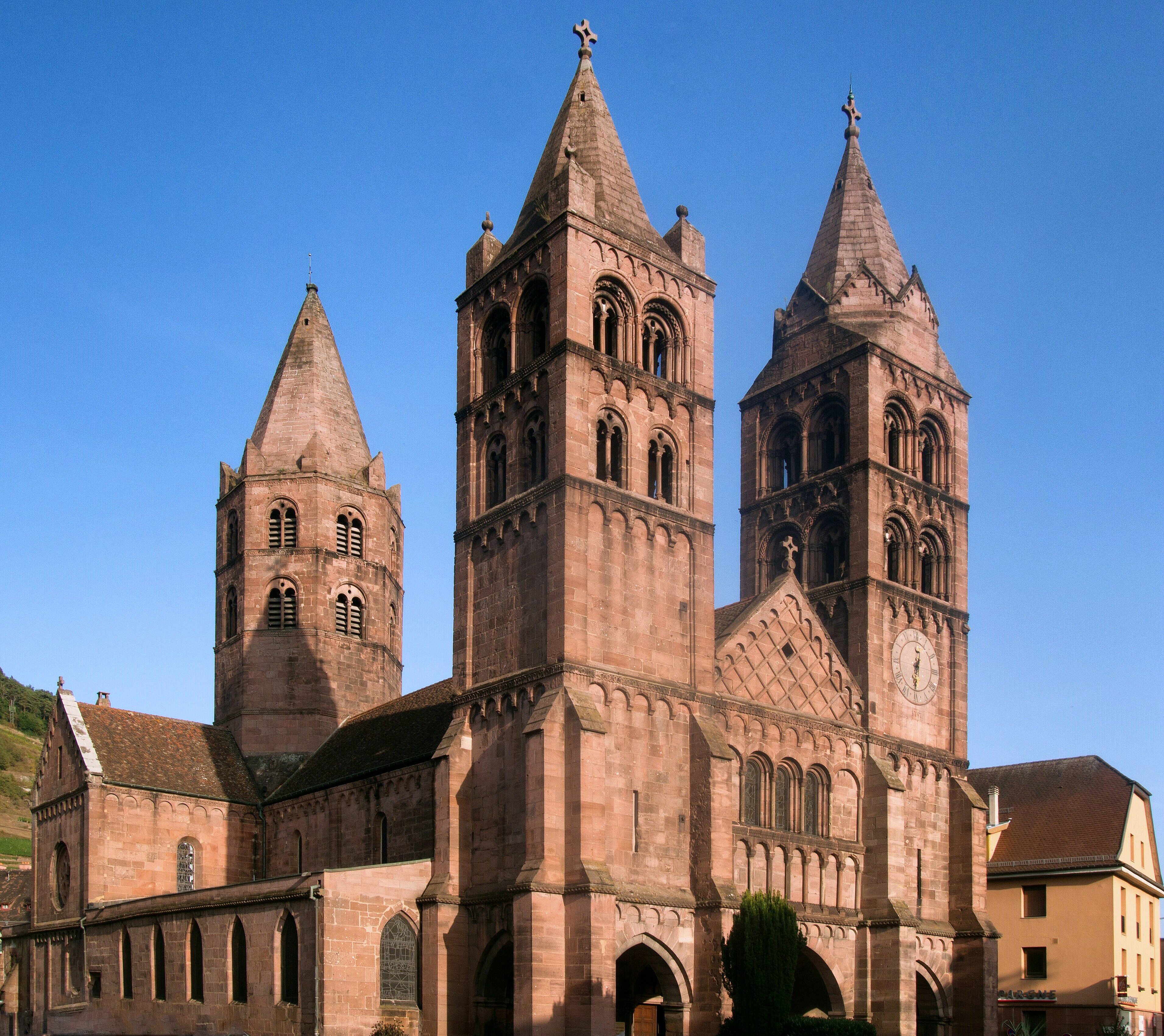 Saint-Léger (Guebwiller)